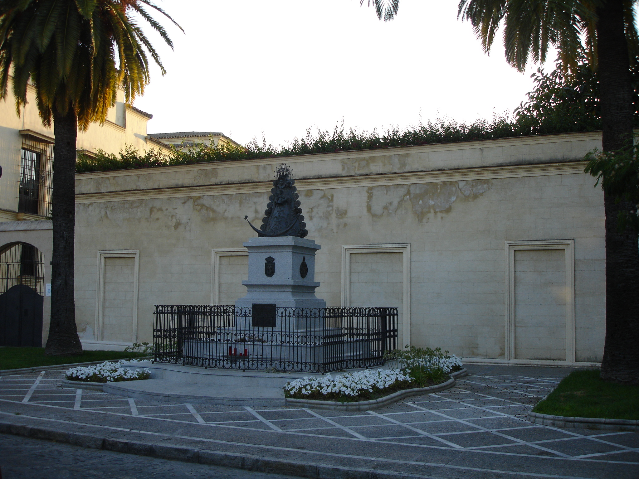 Monumento a la Virgen del Rocio. Jerez de la Frontera, Andalusia (Spain)